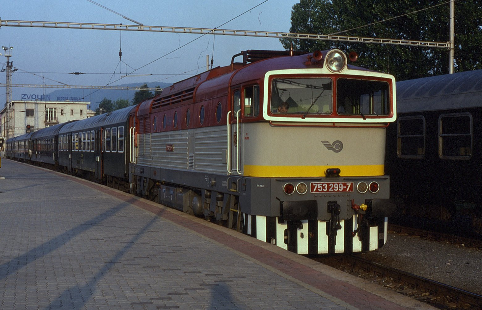 Vlak Železnic Slovenské republiky s motorovou lokomotivou 753.299, Zvolen